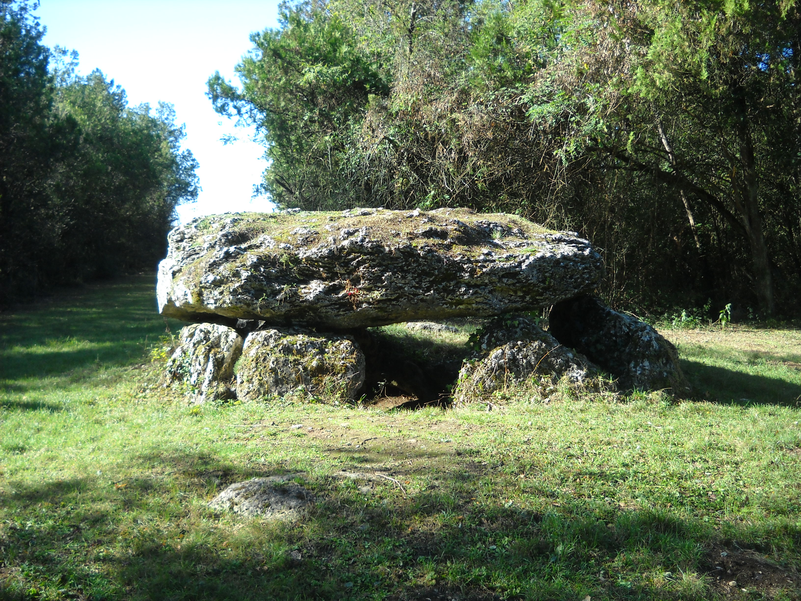 Dolmen caché dans une clairière au milieu d'un bosquet .